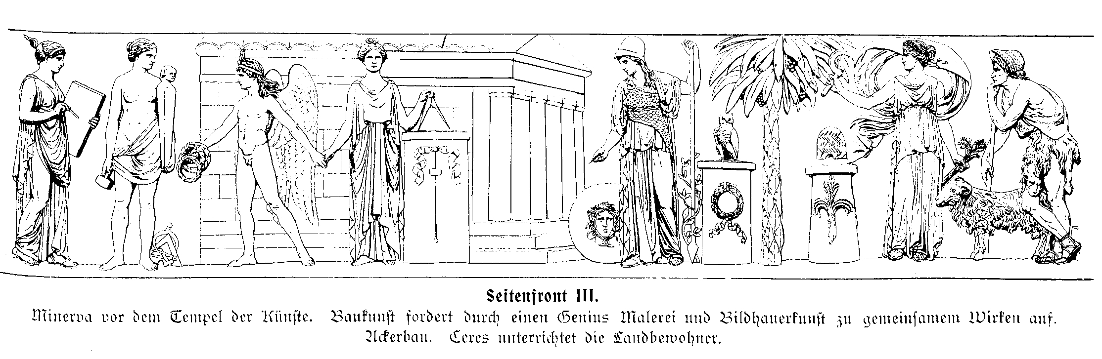 Der Münzfries von Johann Gottfried Schadow, Teil 5.